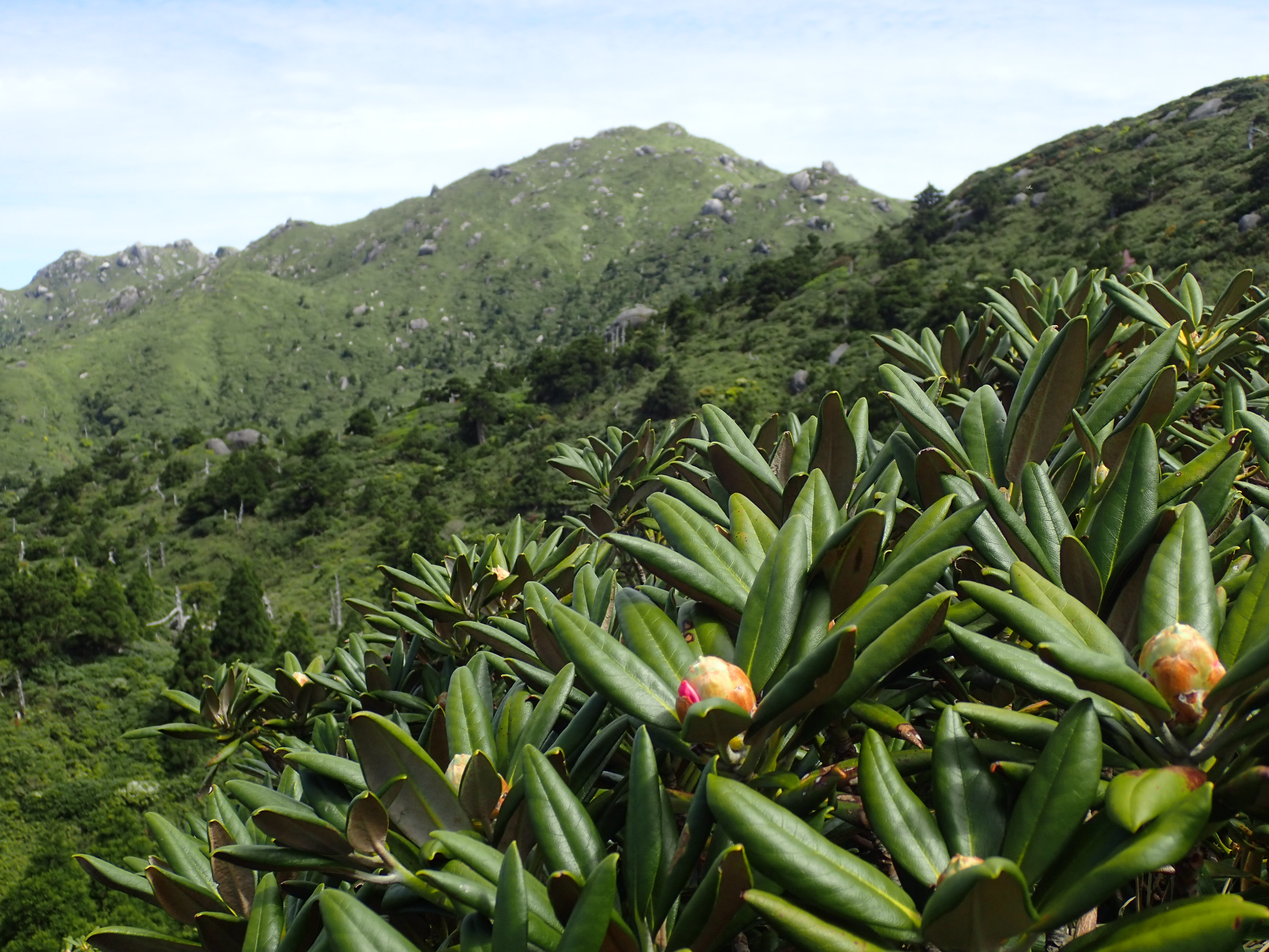 ヤクシマシャクナゲの蕾。背景は宮之浦岳。